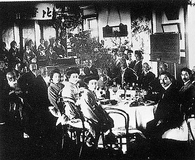 大正2年シャトー本館２階の板垣退助